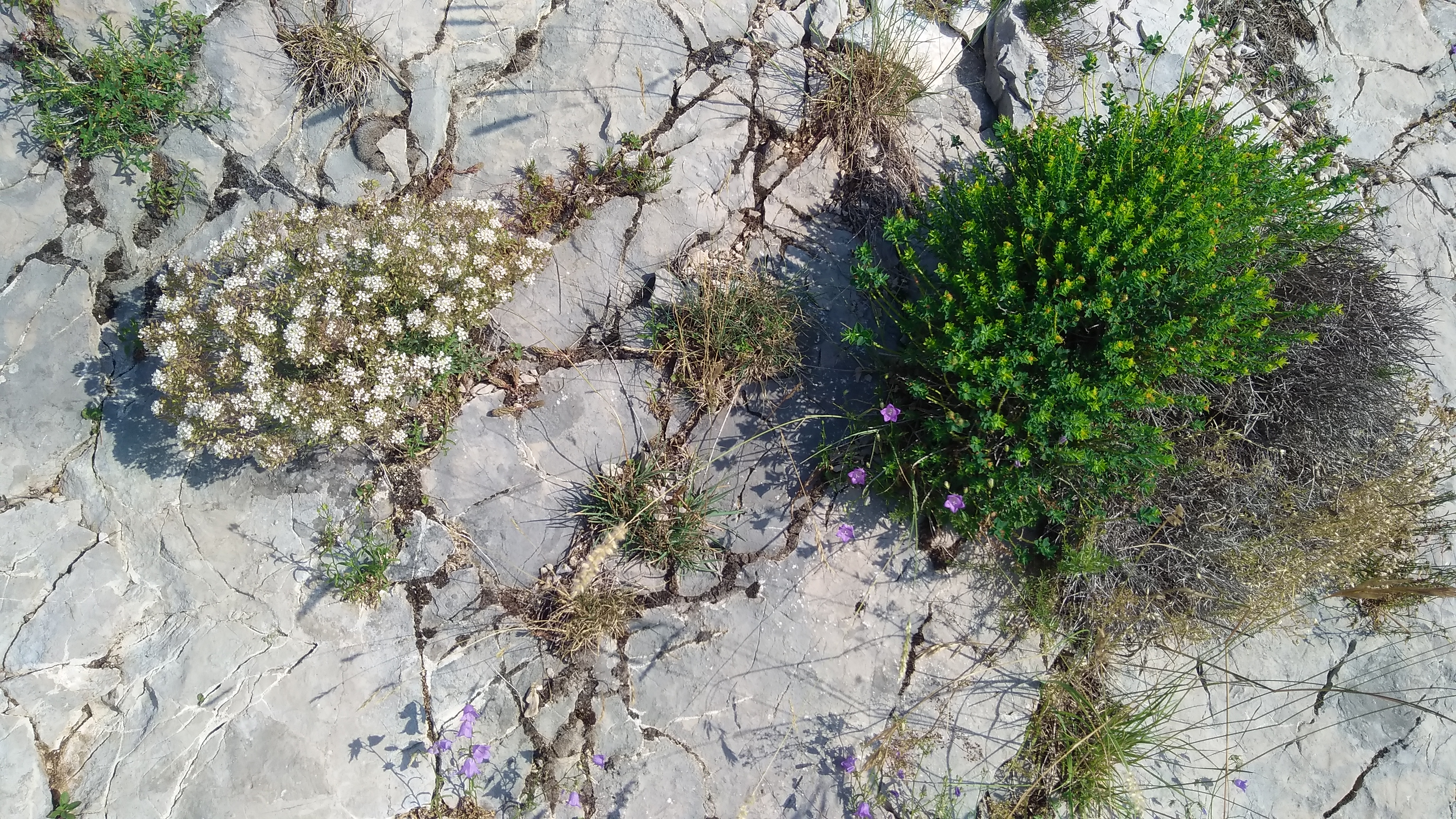 Monte Grammondo - Torrente Bevera (Q47502132)